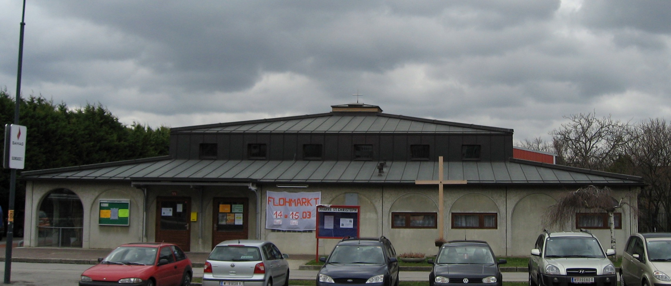 Wien, Trabrenngründe, Pfarrkirche St. Christoph am Rennbahnweg